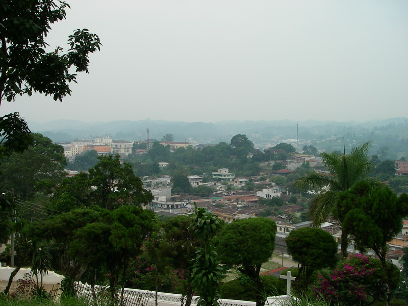 Vue de Cobán du El Calvario